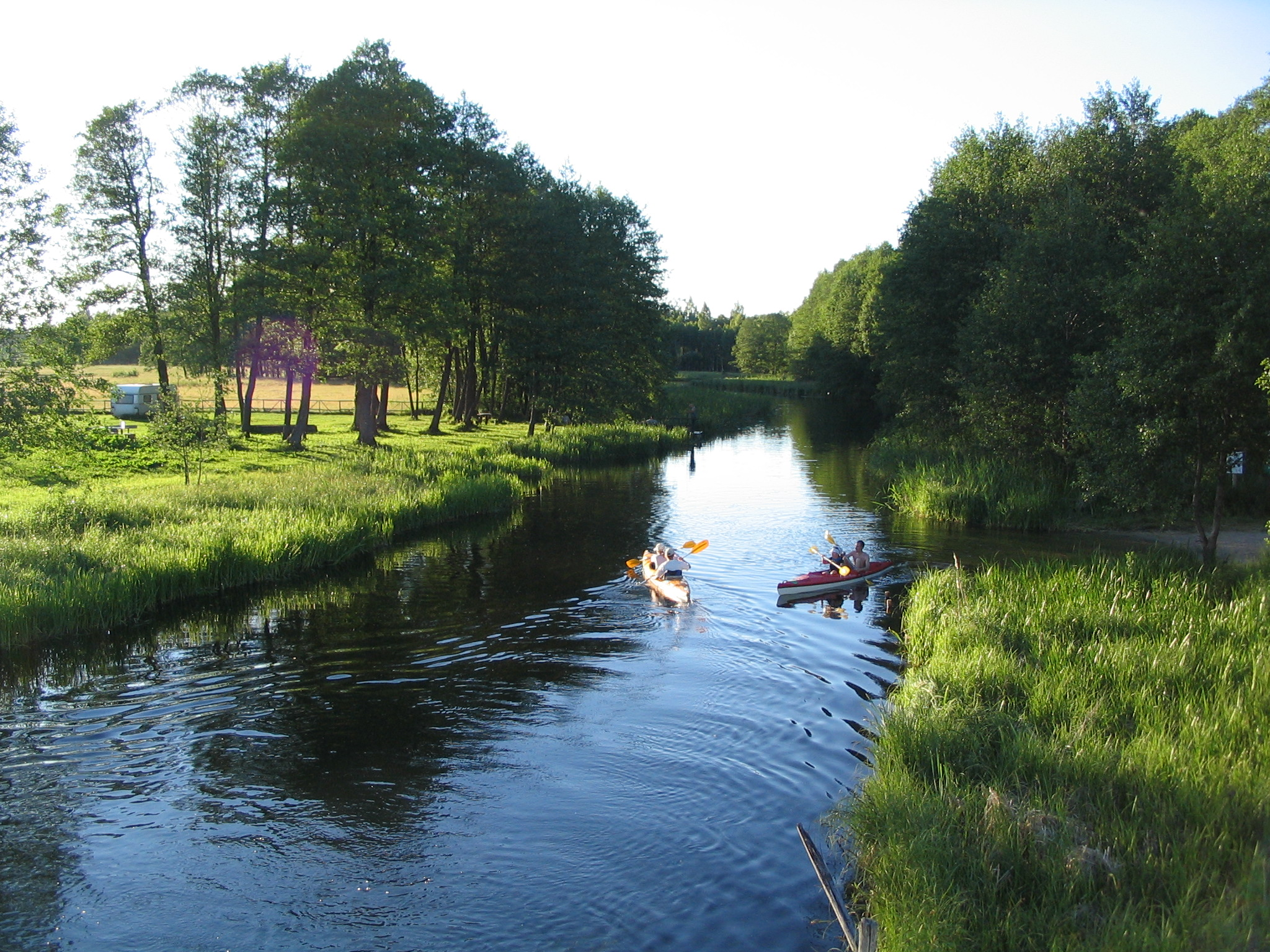 Krutynia w Nowym Moście Author:Piotr Tysarczyk